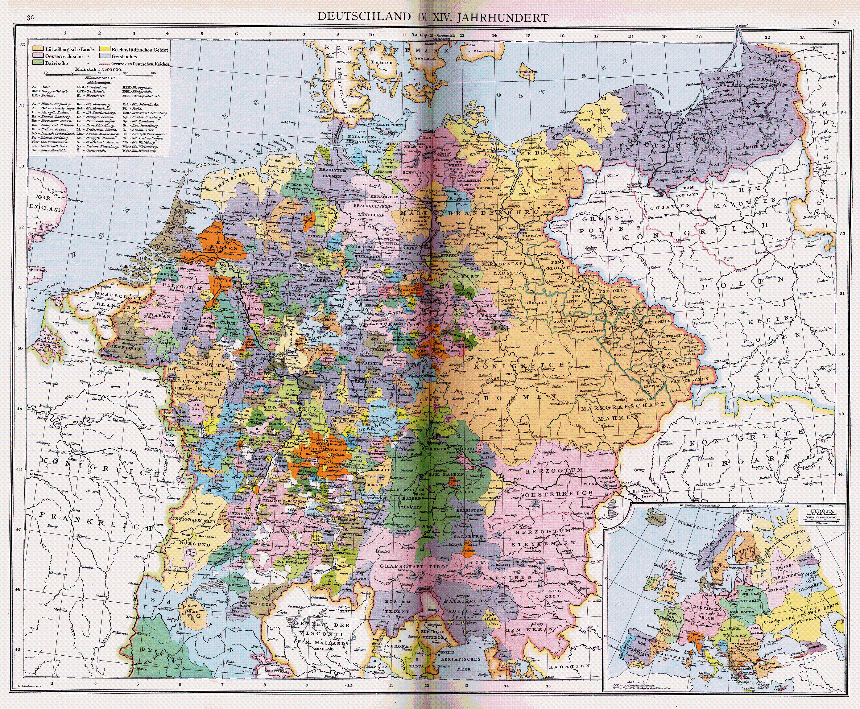 Heiliges Römisches Reich um 1400